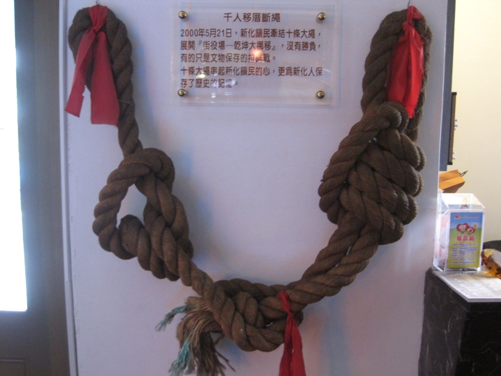 搬遷新化街役場時的繩子